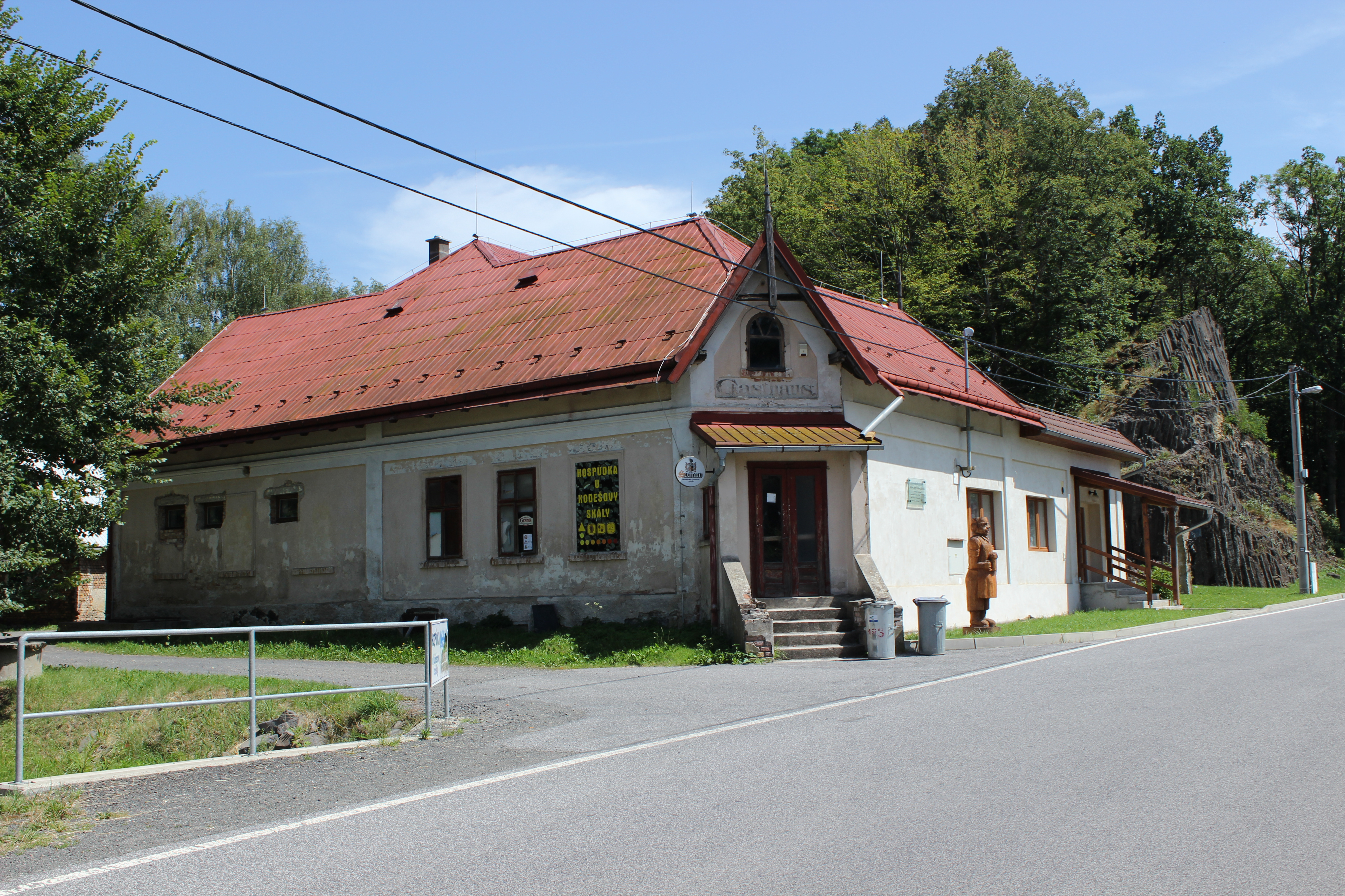 Někdejší hospůdka U Kodešovy skály v Heřmanicích, v okrese Liberec.